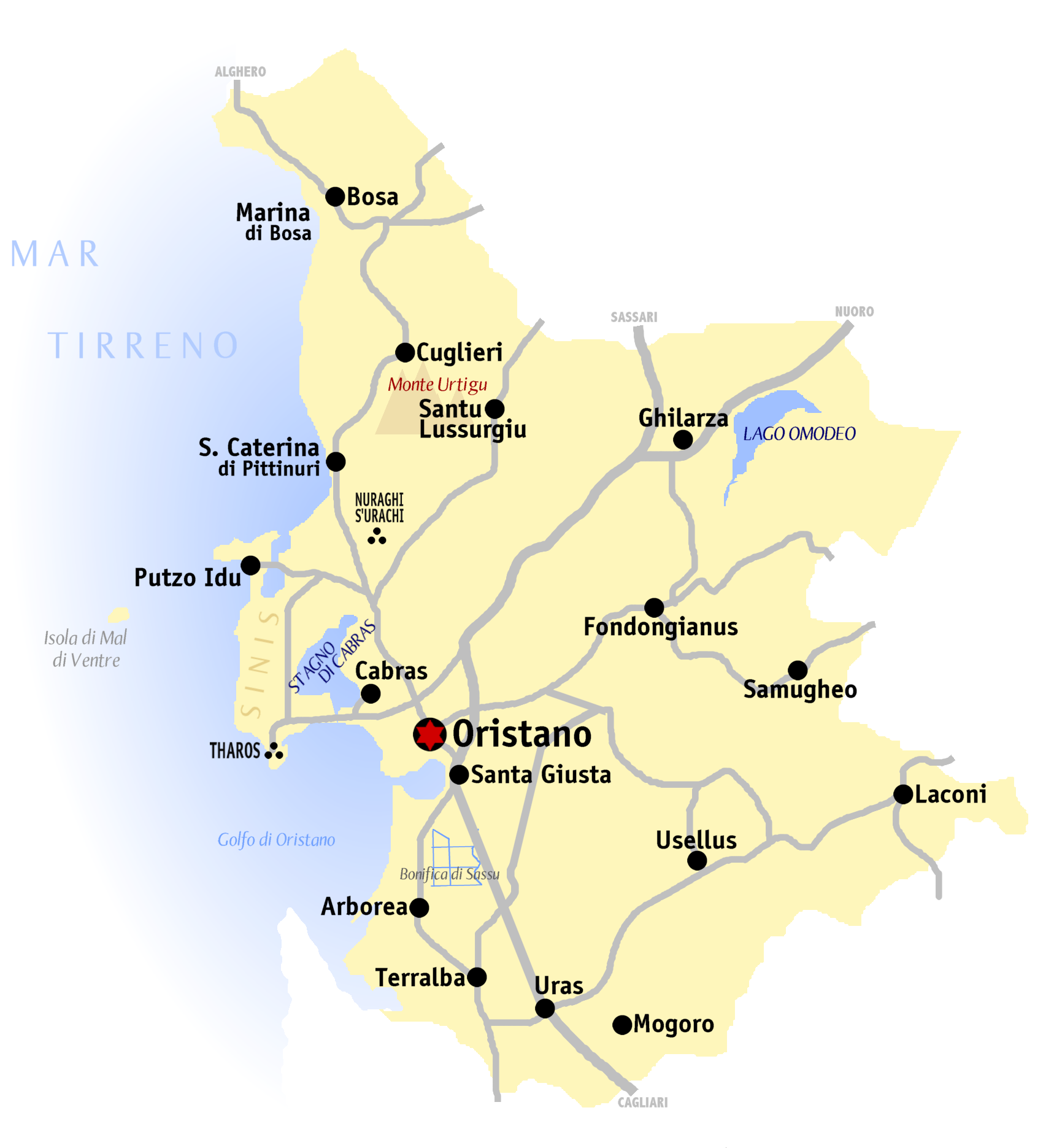 Kaart van de provincie Oristano